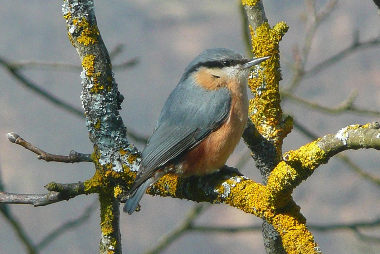 Picchio muratore Sitta europaea cisalpina, Nociveglia, Parma prov, Emilia-Romagna, Italy.